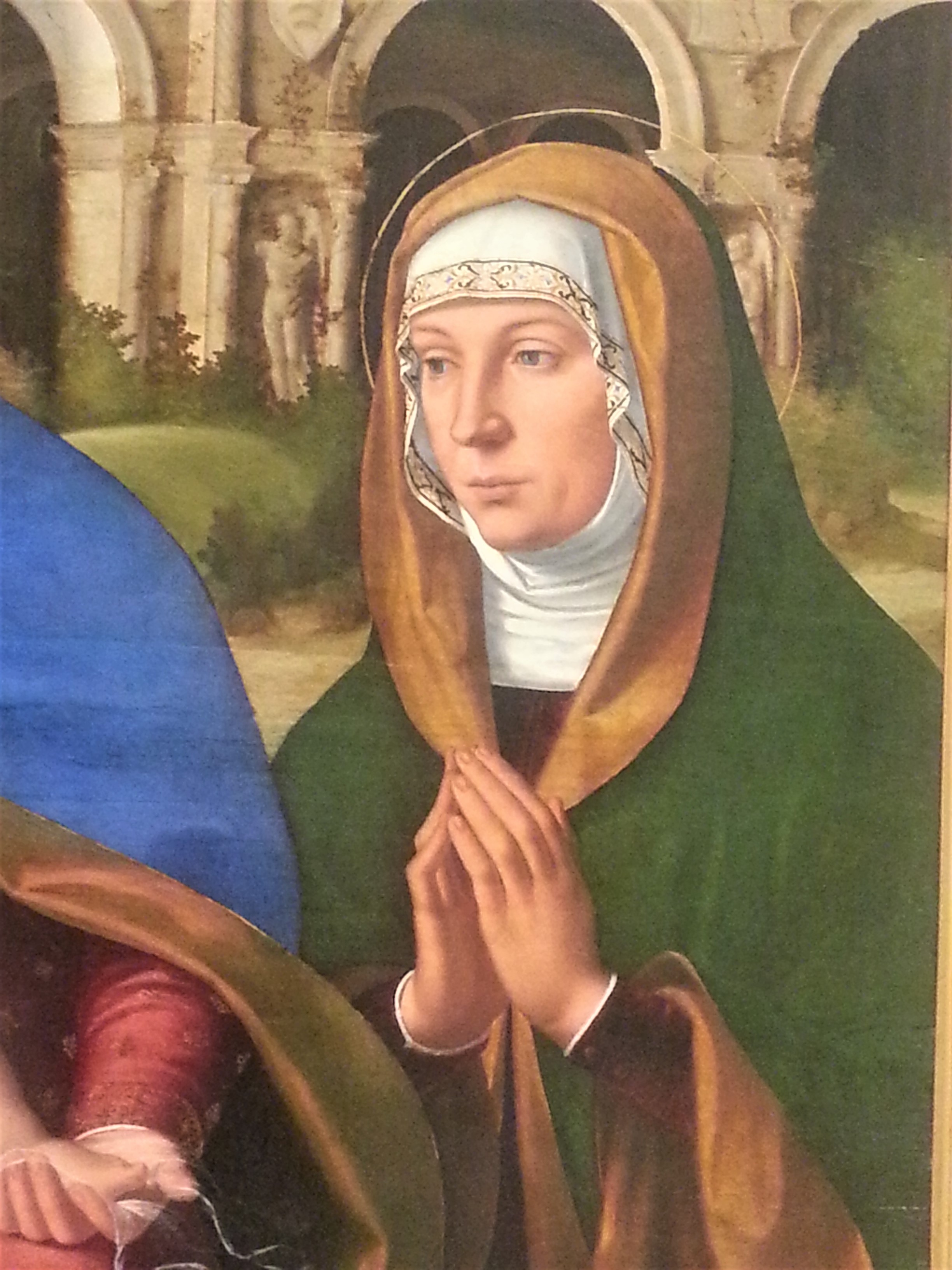 Particolare della santa nel dipinto di Andrea Previtali Madonna Baglioni